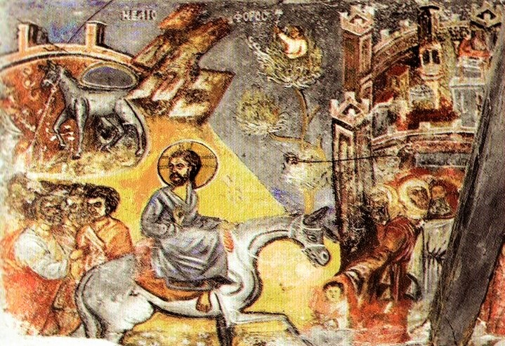 Фреска во црквата „Св. Богородица“ во прилепско Мажучишта